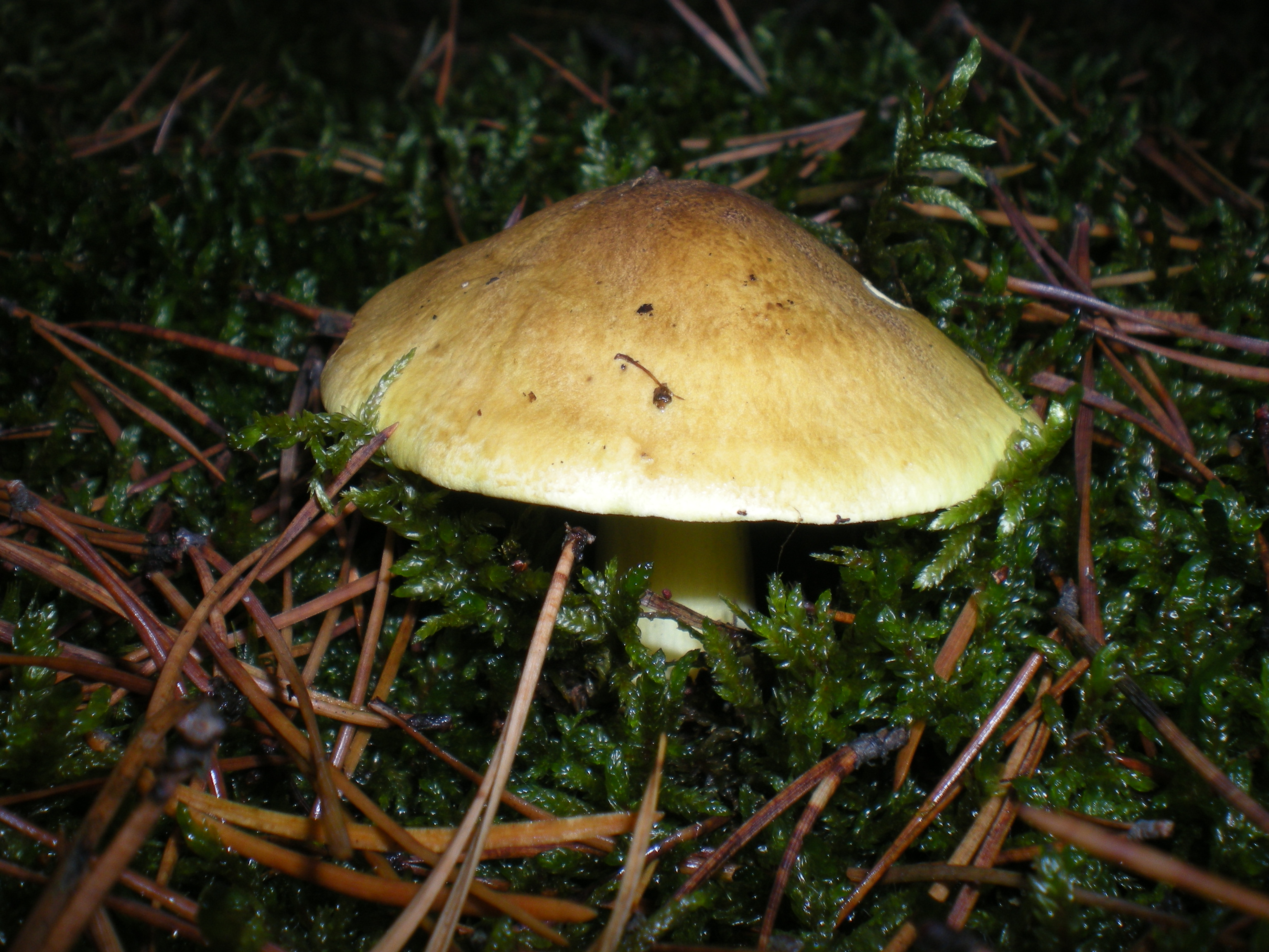 Gąska zielonka